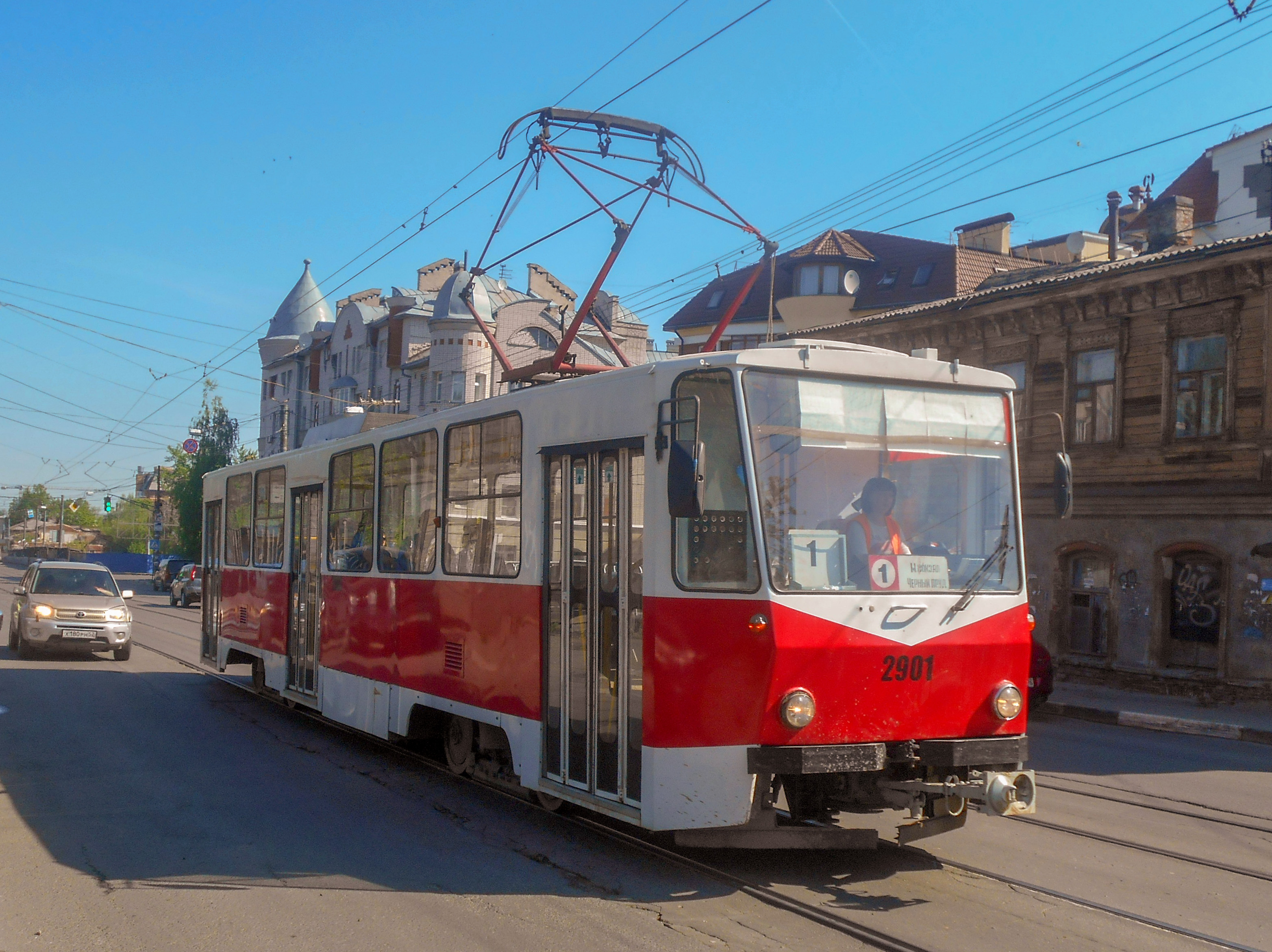 Трамвай Tatra T6B5 № 2901 после капитального ремонта в Нижнем Новгороде